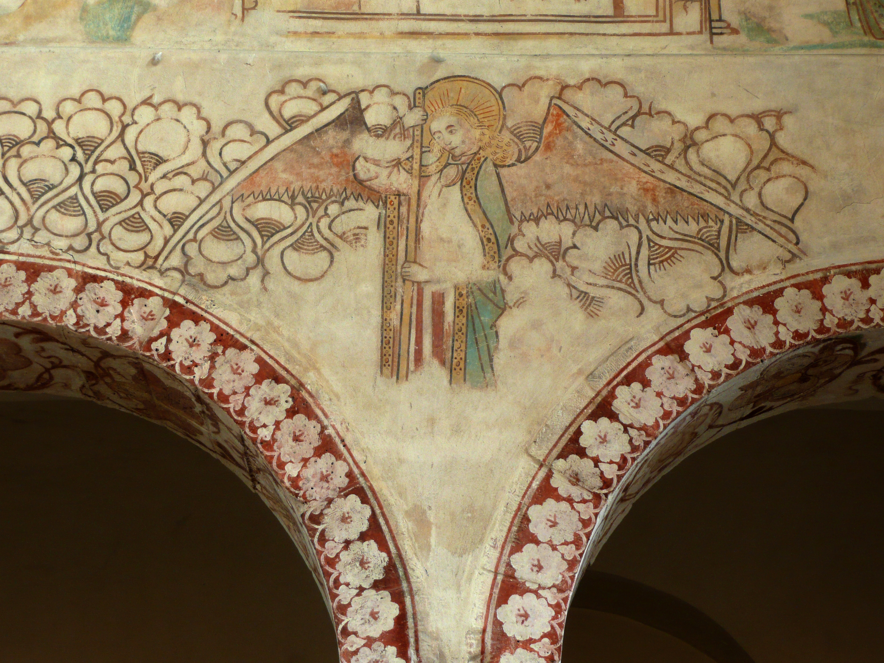 Fresko des Erzengel Michael am Westportal der Westkirche des ehemaligen Benediktiner-Klosters Bursfelde. Innenansicht von Osten.